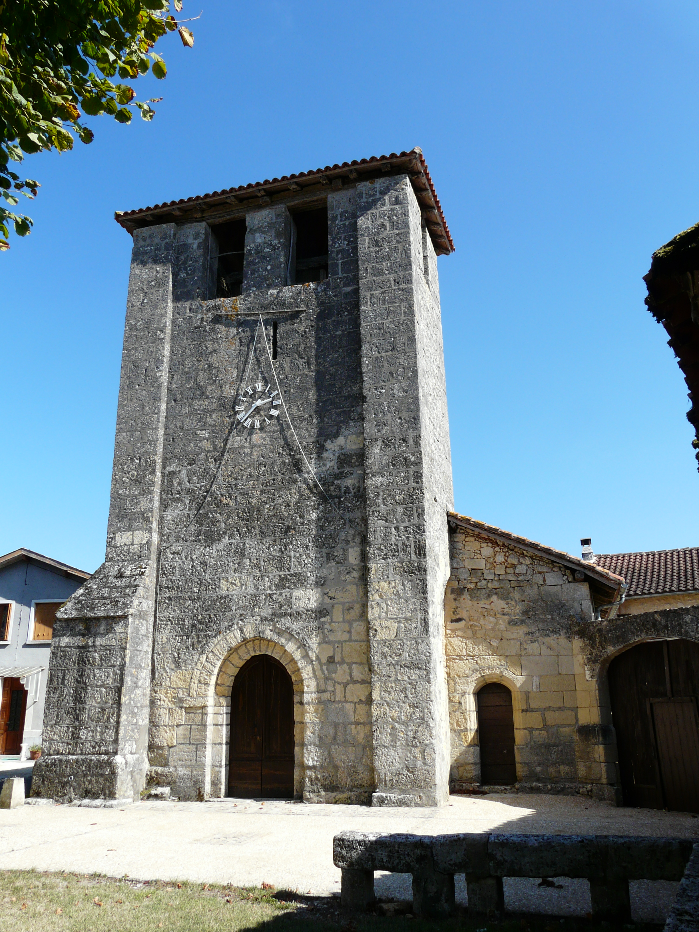 La façade ouest de l'église Saint-Julien, Saint-Julien-de-Bourdeilles, Dordogne, France Object location45° 21′ 35.8″ N, 0° 35′ 22.5″ E